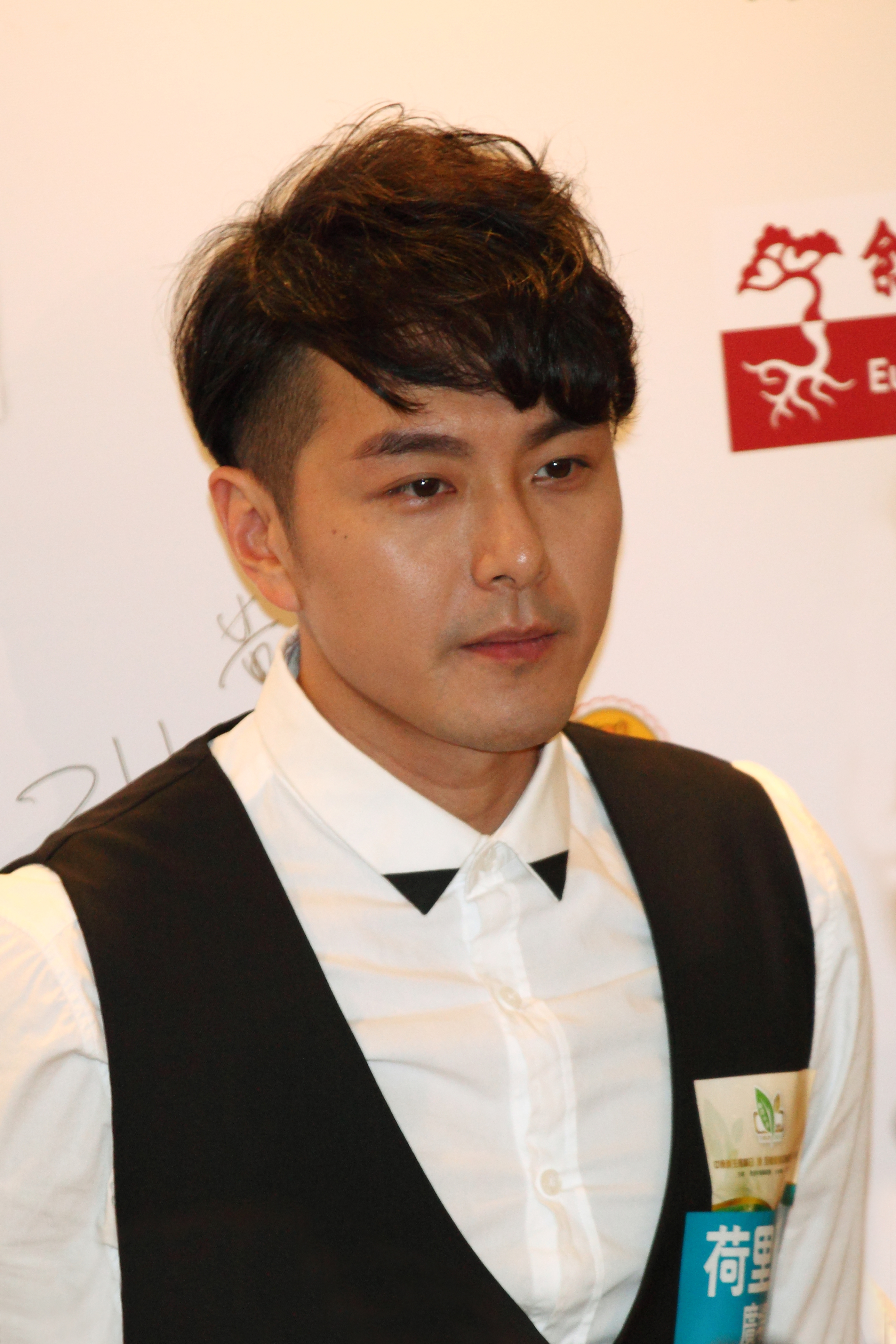 萧正楠 Edwin